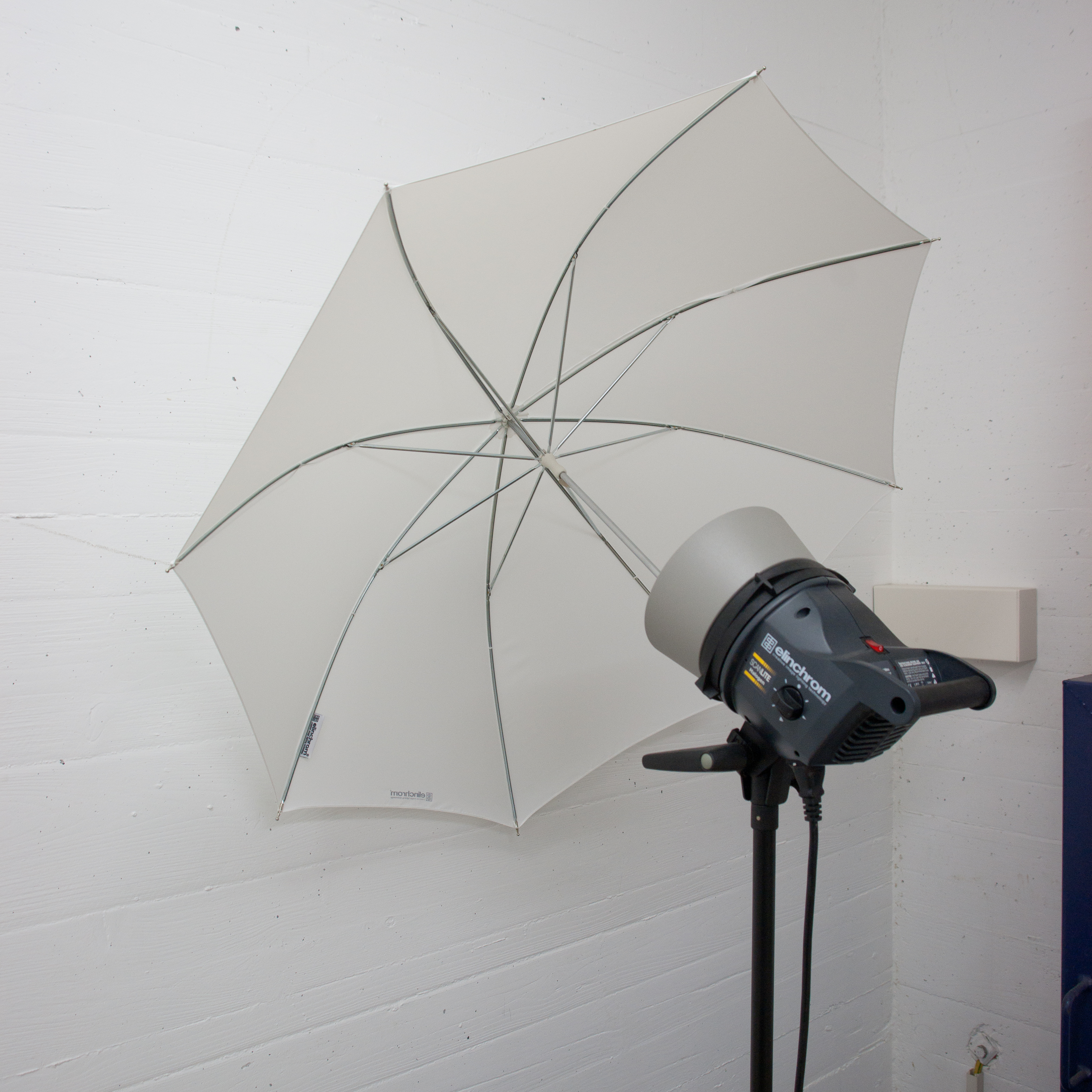 Spot photo - WMCH